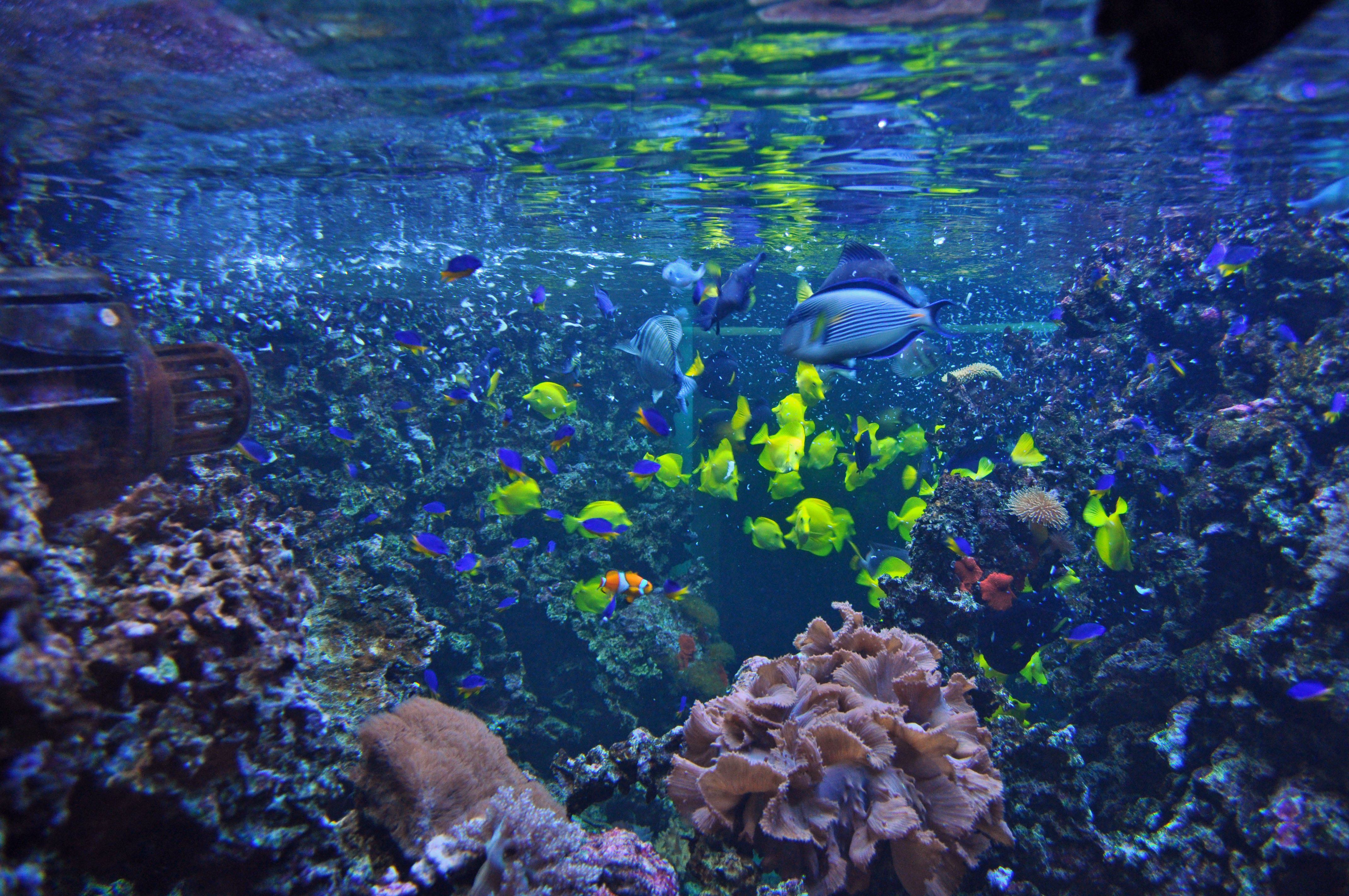 Im Meeresmuseum Stralsund. Das Deutsche Meeresmuseum ist in der ehemaligen Katharinenkirche untergebracht.